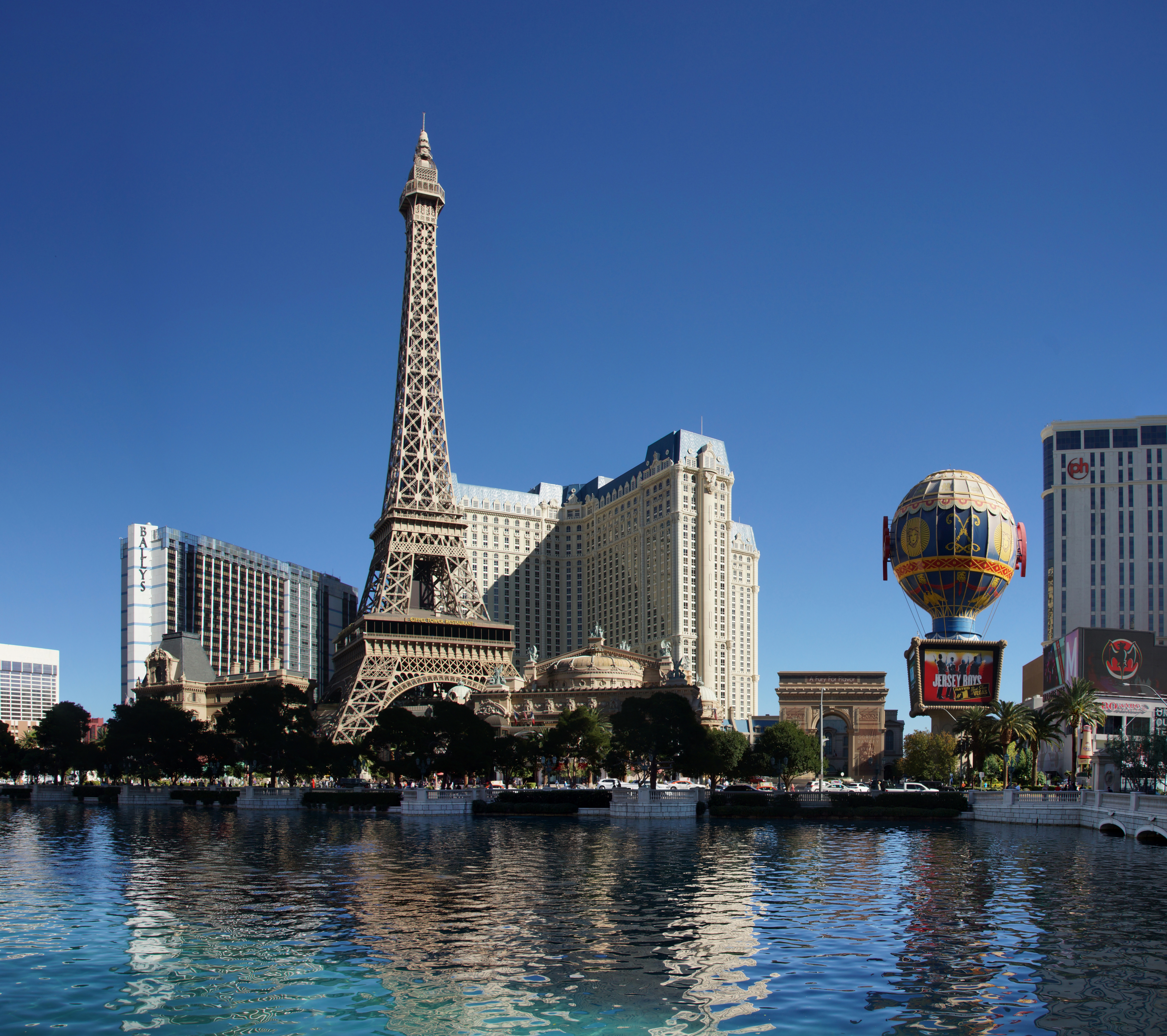 The Paris Hotel - Las Vegas - Nevada - USA